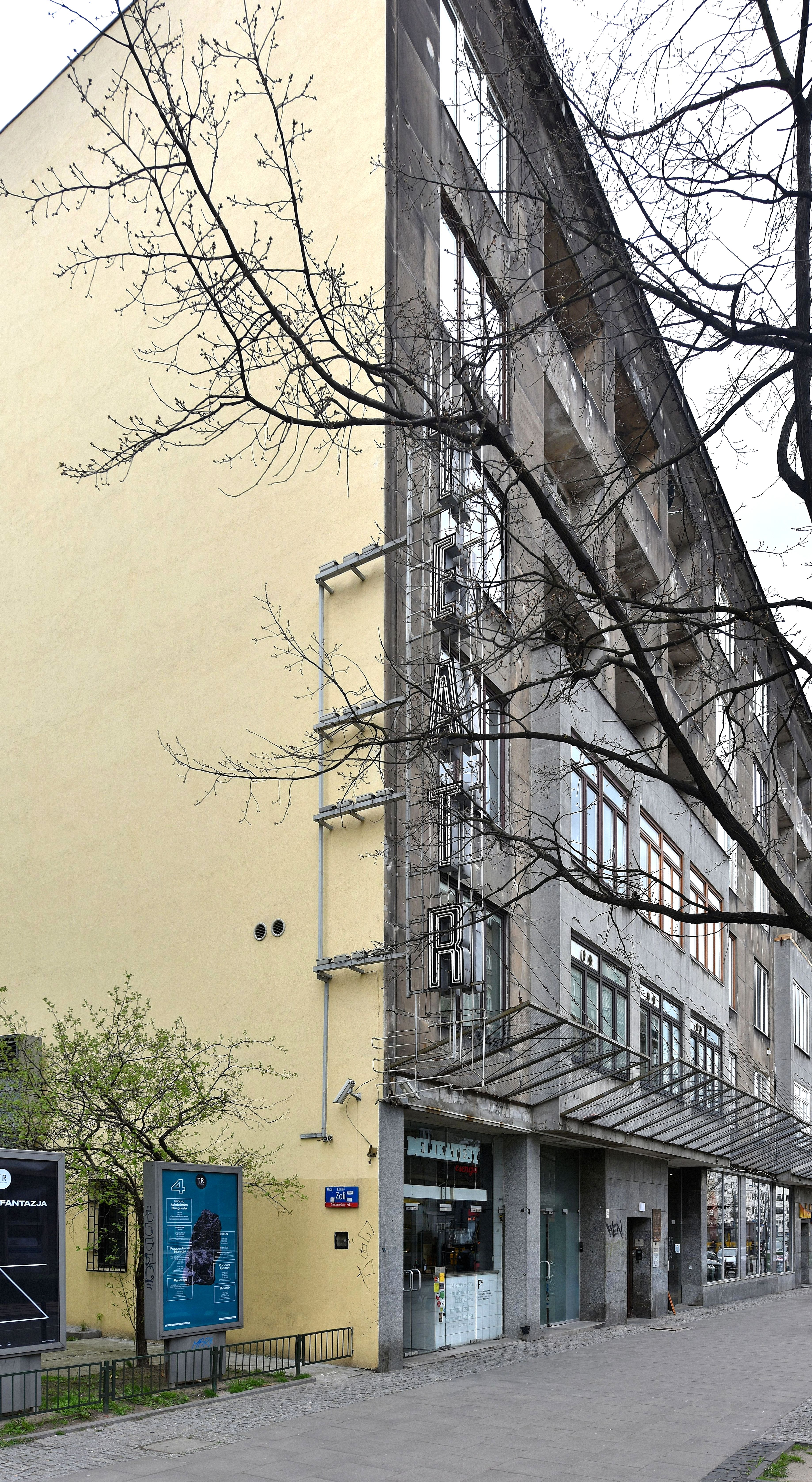 Teatr Rozmaitości przy ul. Marszalkowskiej 8 w Warszawie